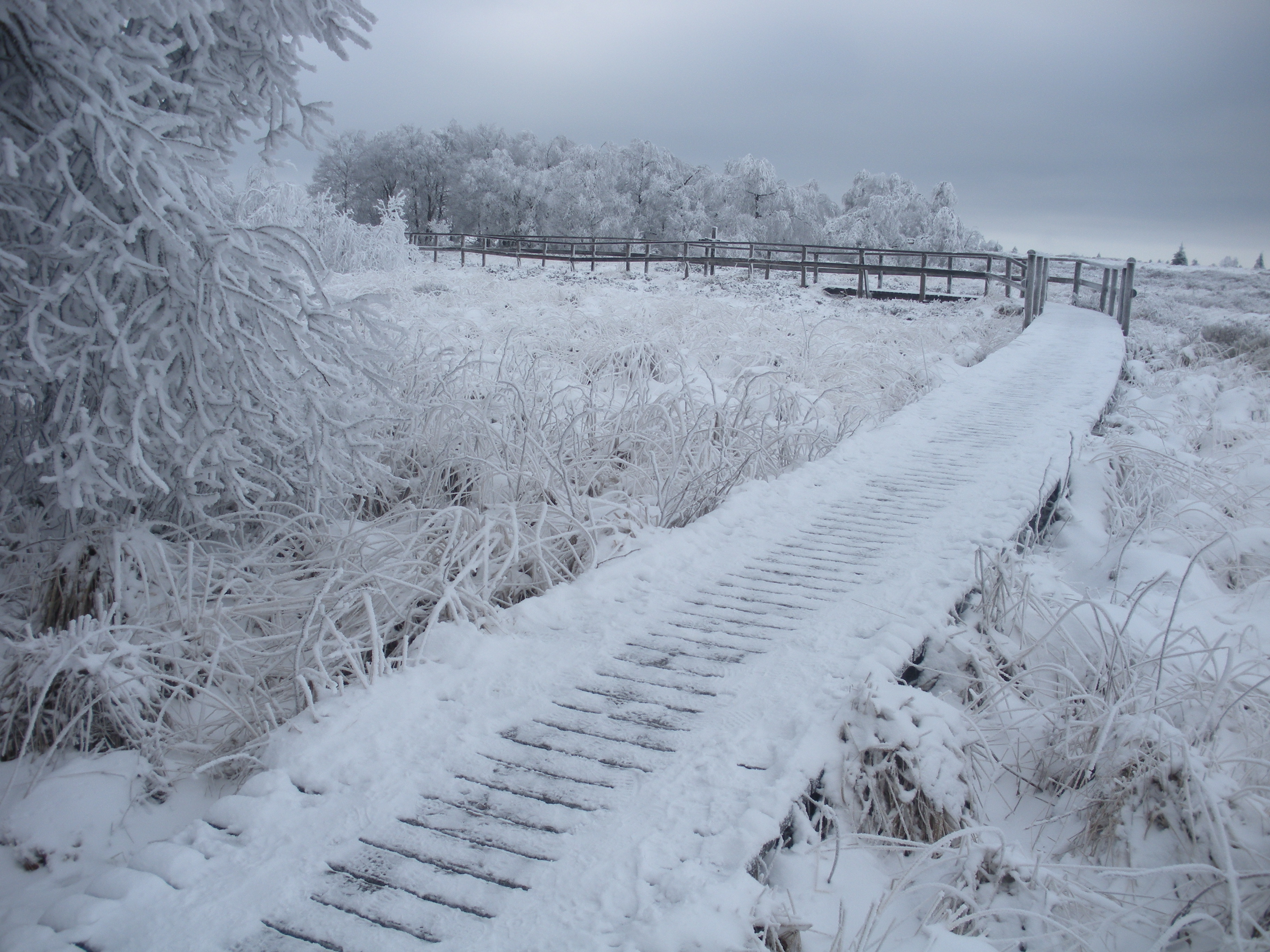 Parc naturel Hautes Fagnes - Eifel